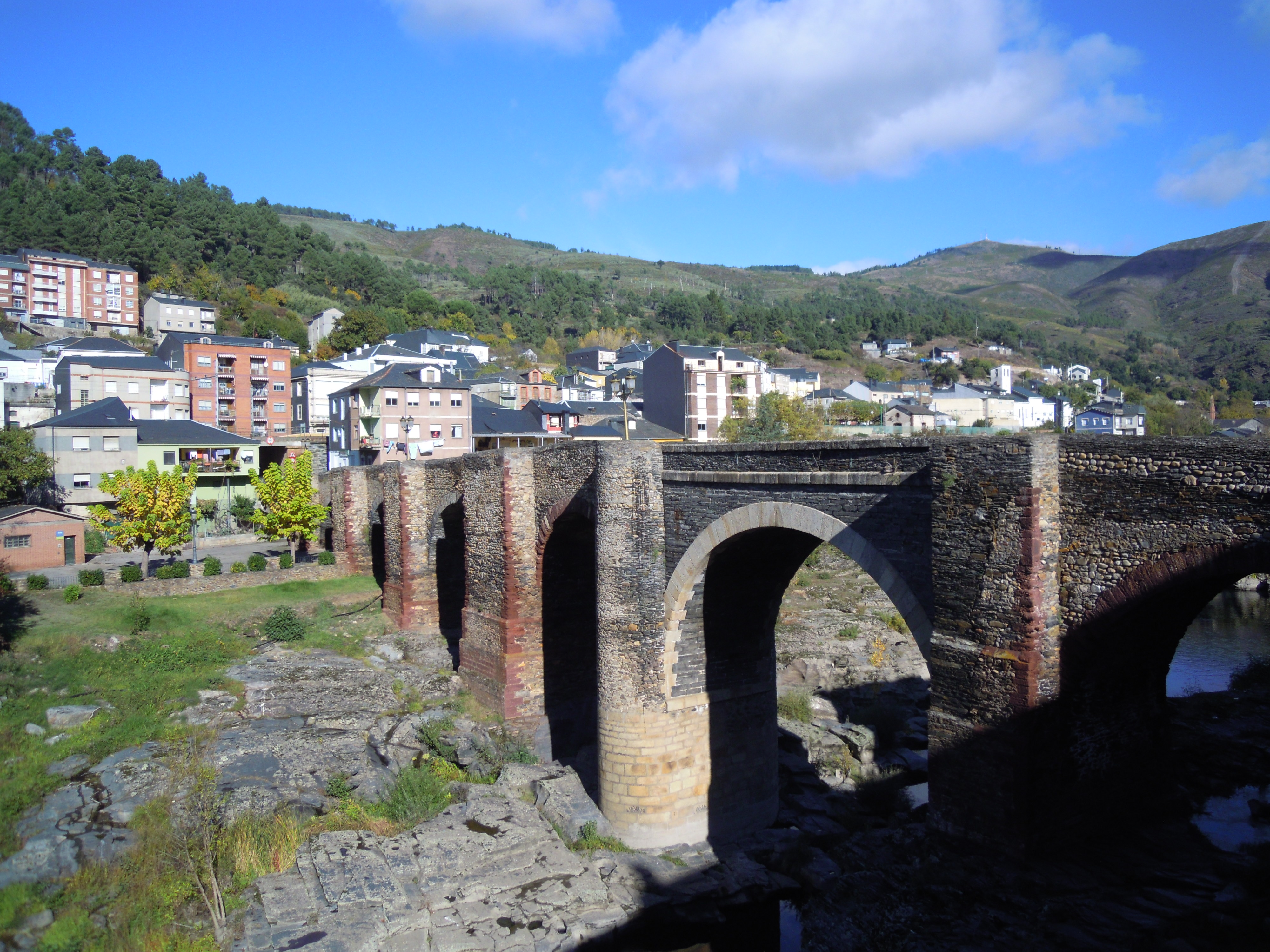 Ponte Nova de Sobradelo (Carballeda de Valdeorras), sobre o río Sil